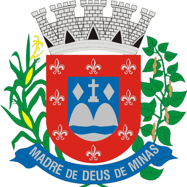 Brasão Oficial do município de Madre de Deus de Minas